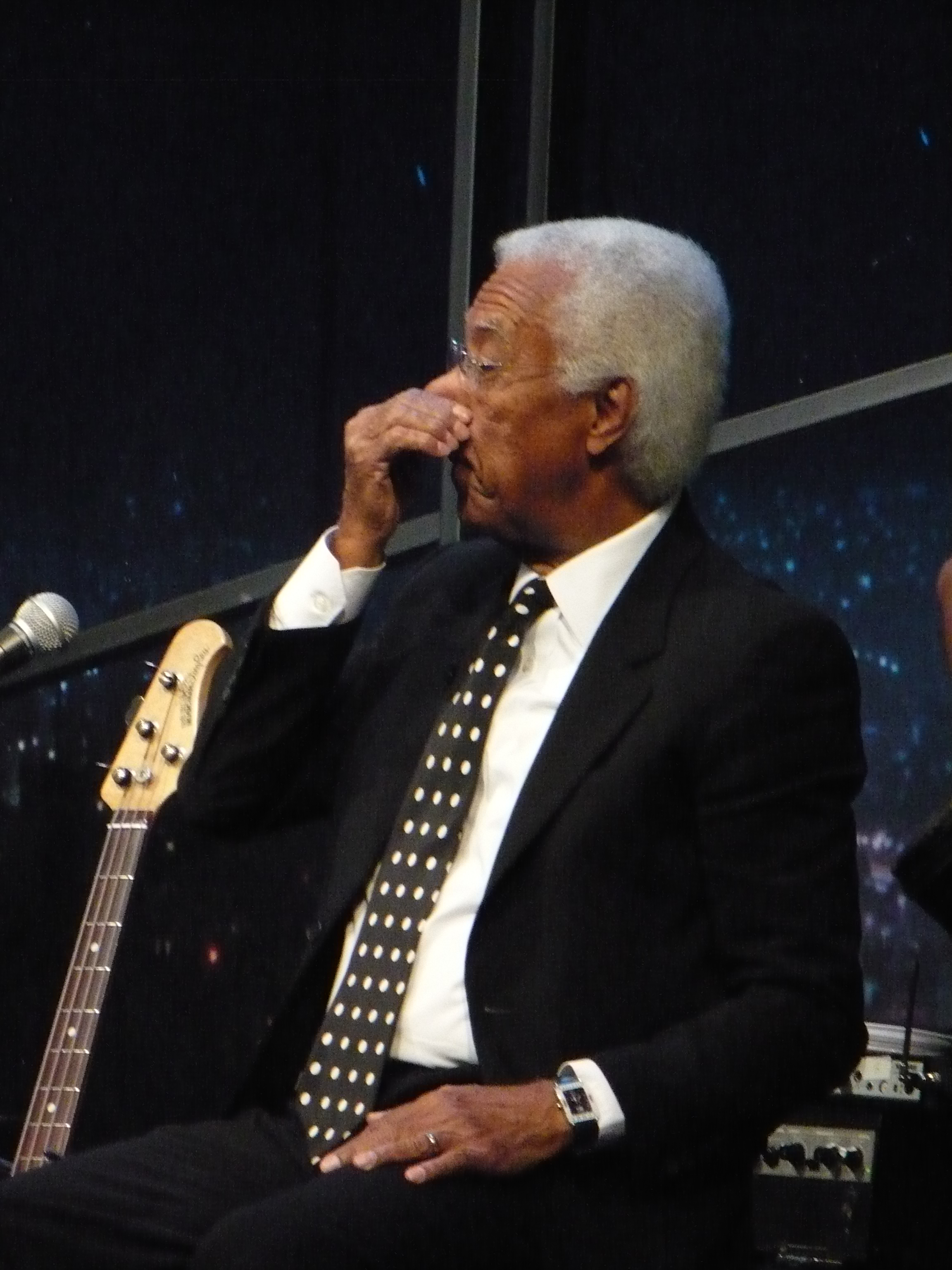 Bira!